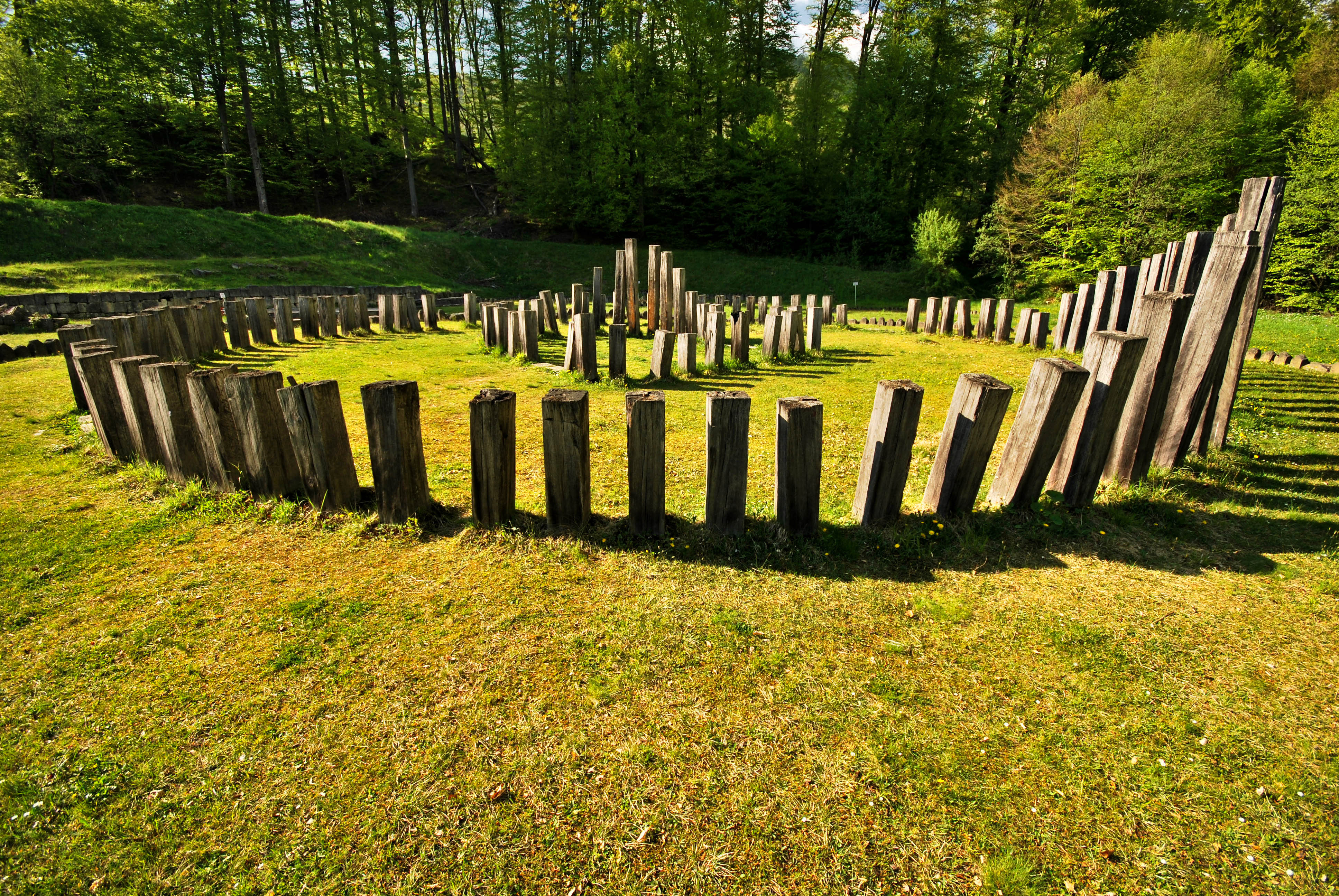 Cetatea dacică Sarmizegetusa Regia a fost capitala Daciei, centrul politic şi religios al statului dac. 03